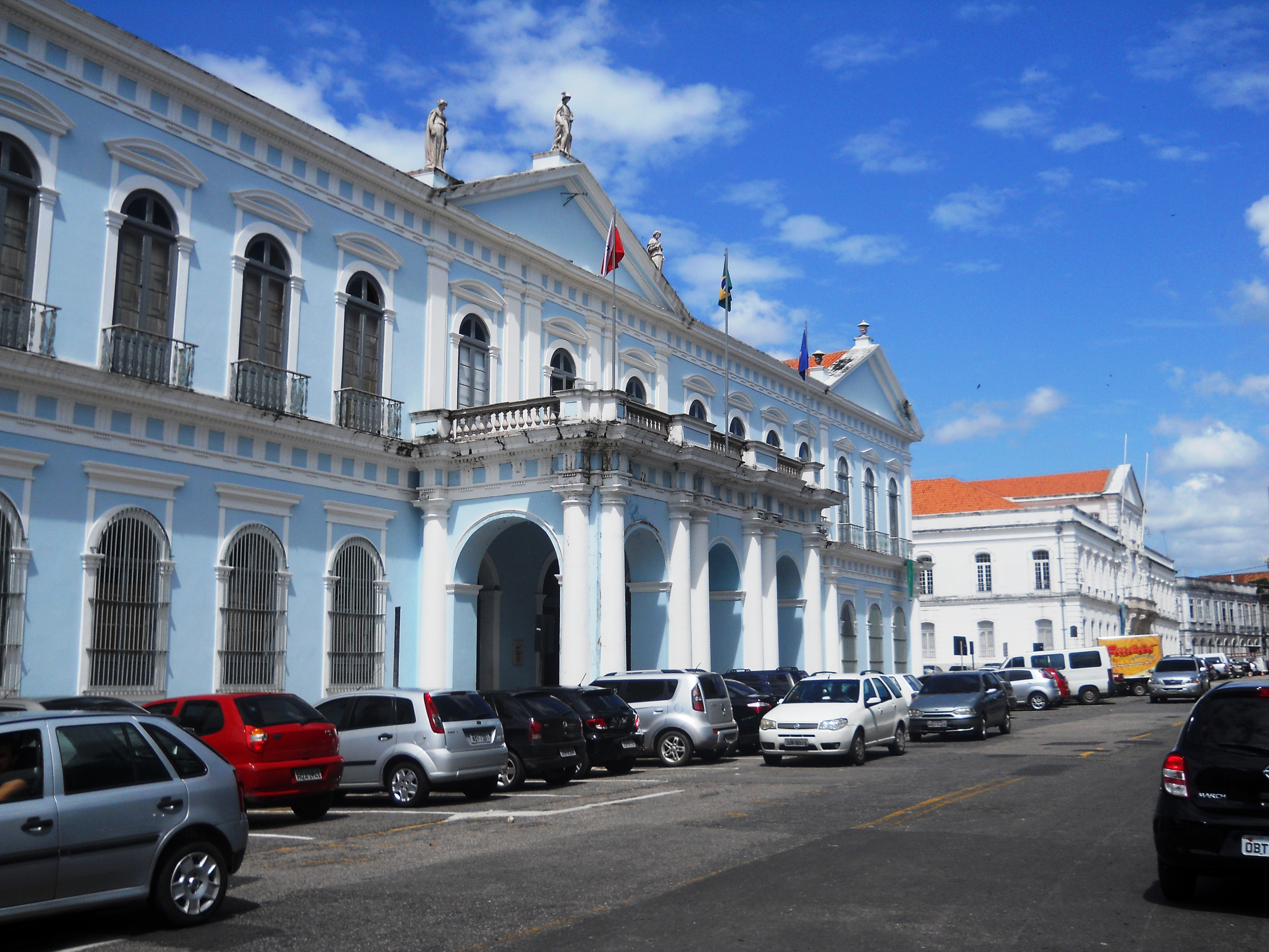 Palacete Azul